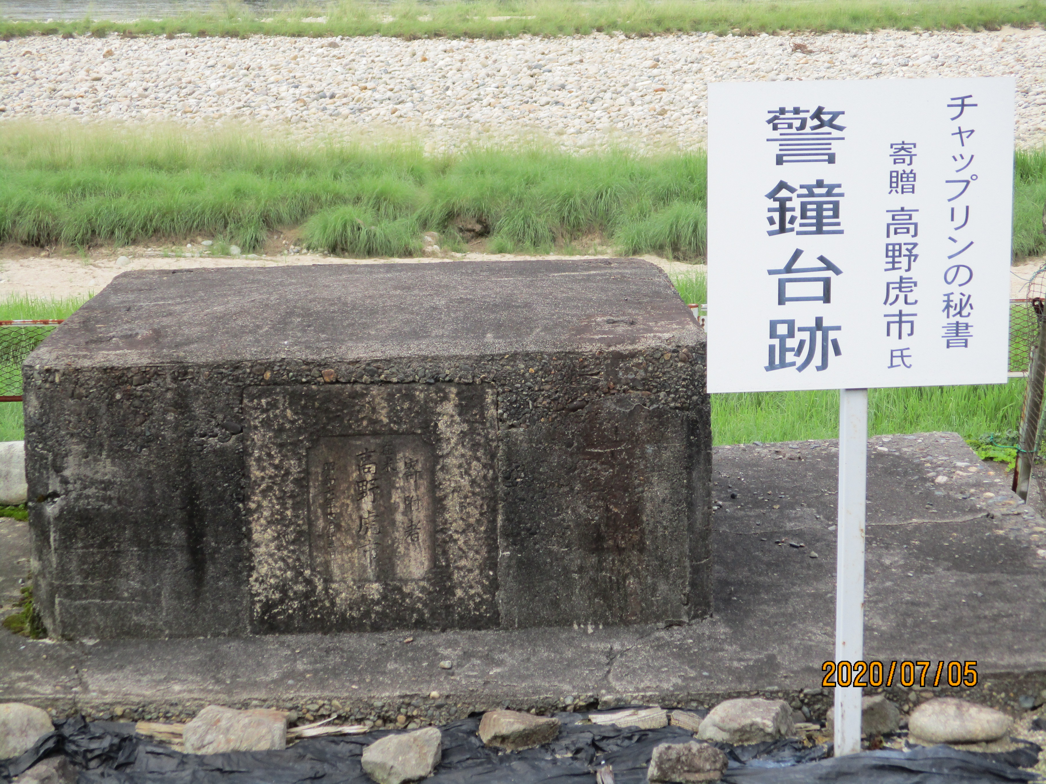 1935年に消防用の火の見櫓を寄贈した。写真は現在も残る寄贈者として高野の名が刻まれた銘板の付いた土台